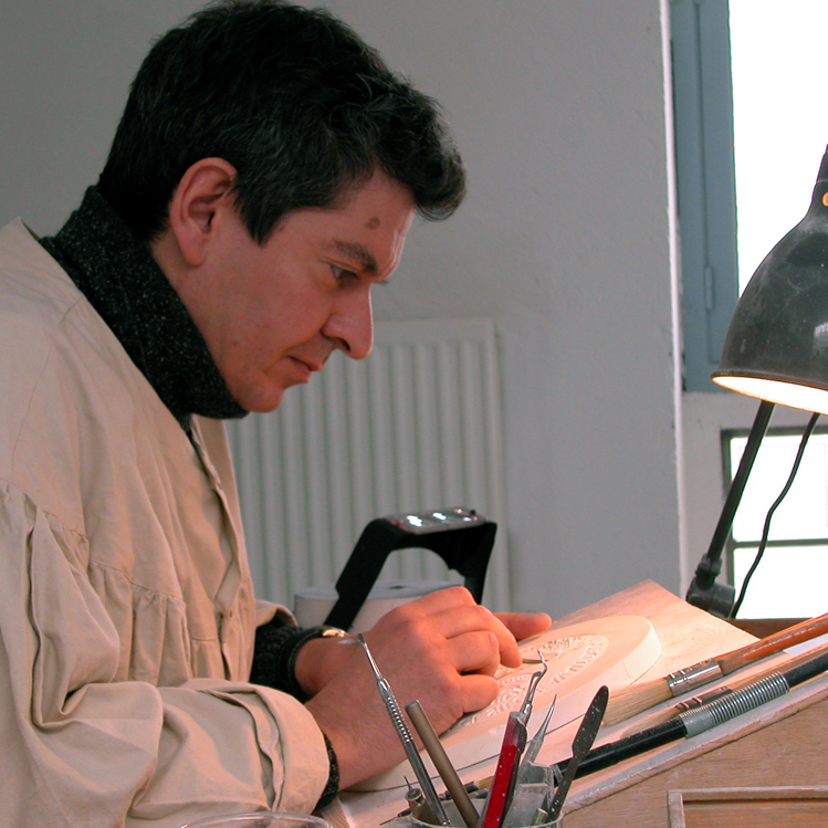 Joaquin Jimenez dans son atelier. Il est créateur pour les Monnaies de plusieurs pays, dont la France